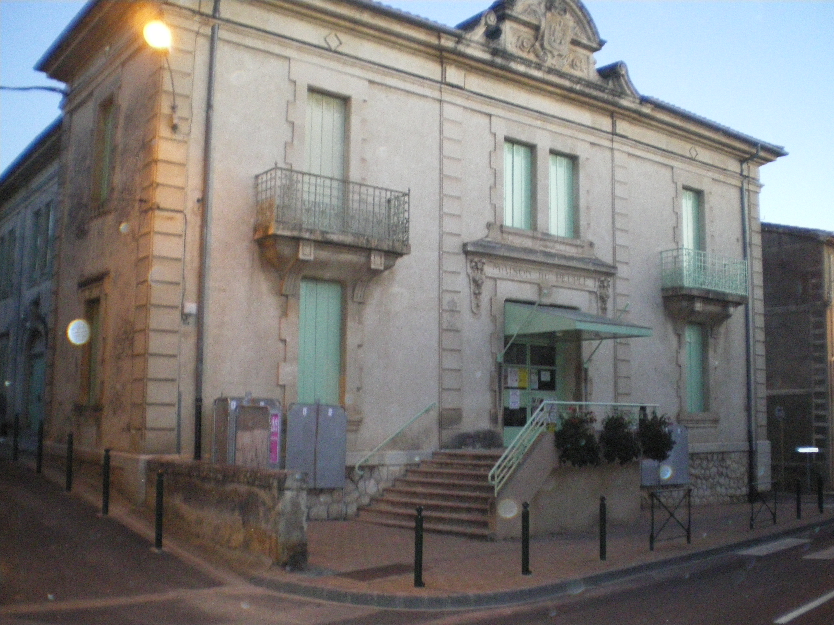 Maison du peuple de Puisserguier (Hérault)